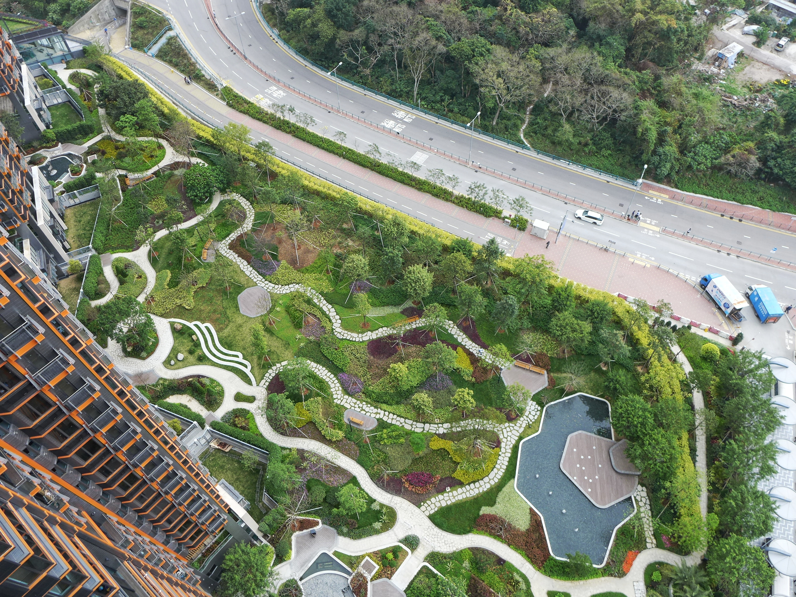 Double Cove Entrance Piazza